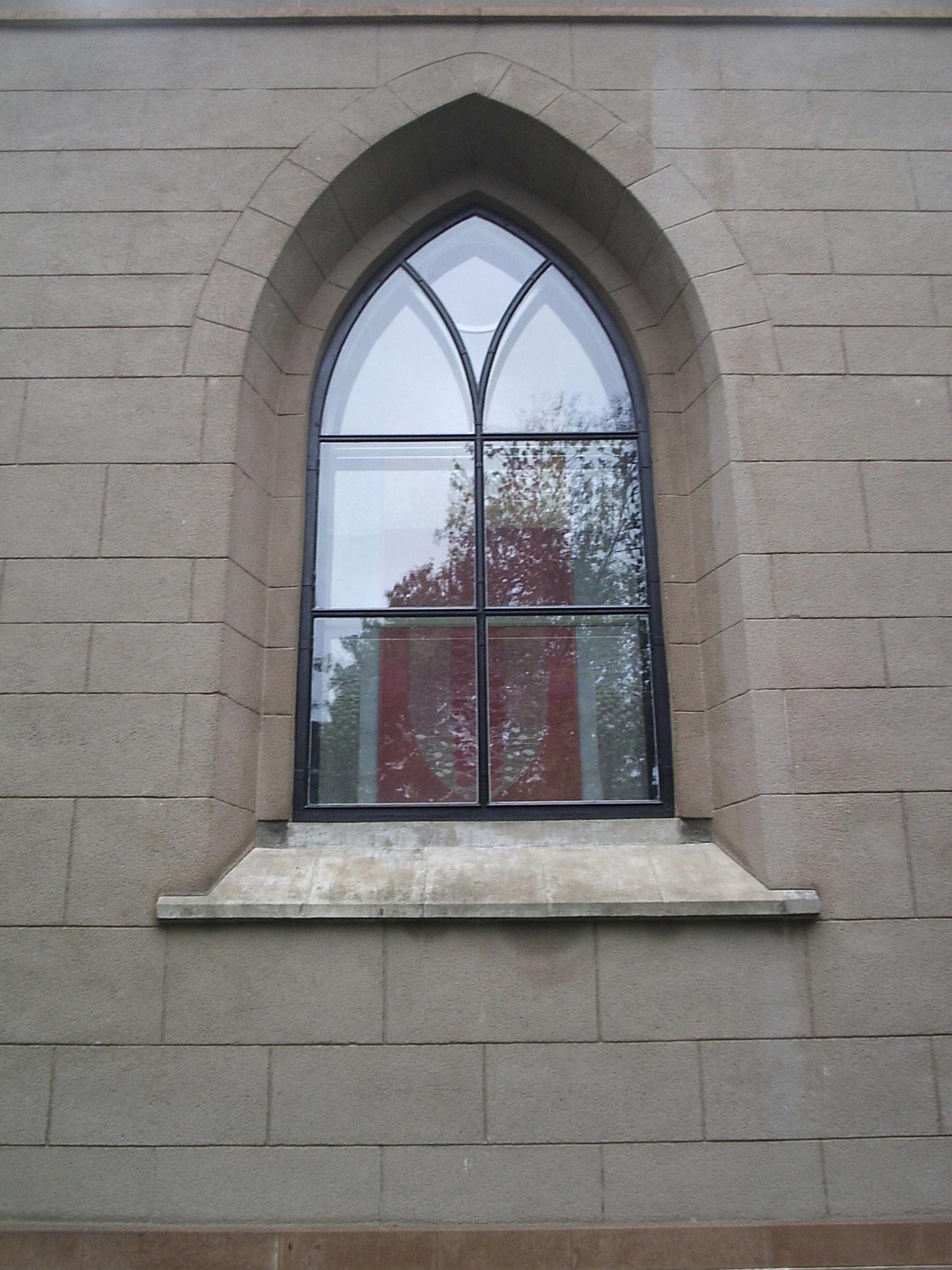 Bilden är fotograferad av Harri Blomberg. Photo by Harri Blomberg.